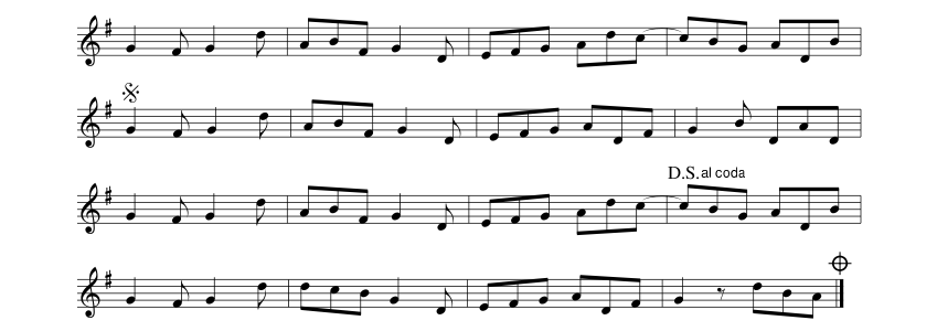 Arquivo .png que contém trecho da canção "The North Star", uma canção tradicional irlandesa, demonstrando o uso dos sinais Segno, e da indicação "Dal Segno al Coda".